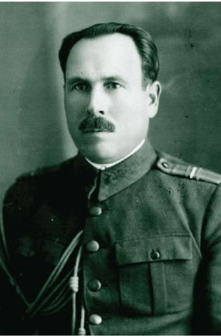 Generalul român Gheorghe Avramescu (1884-1945) în uniformă de colonel.